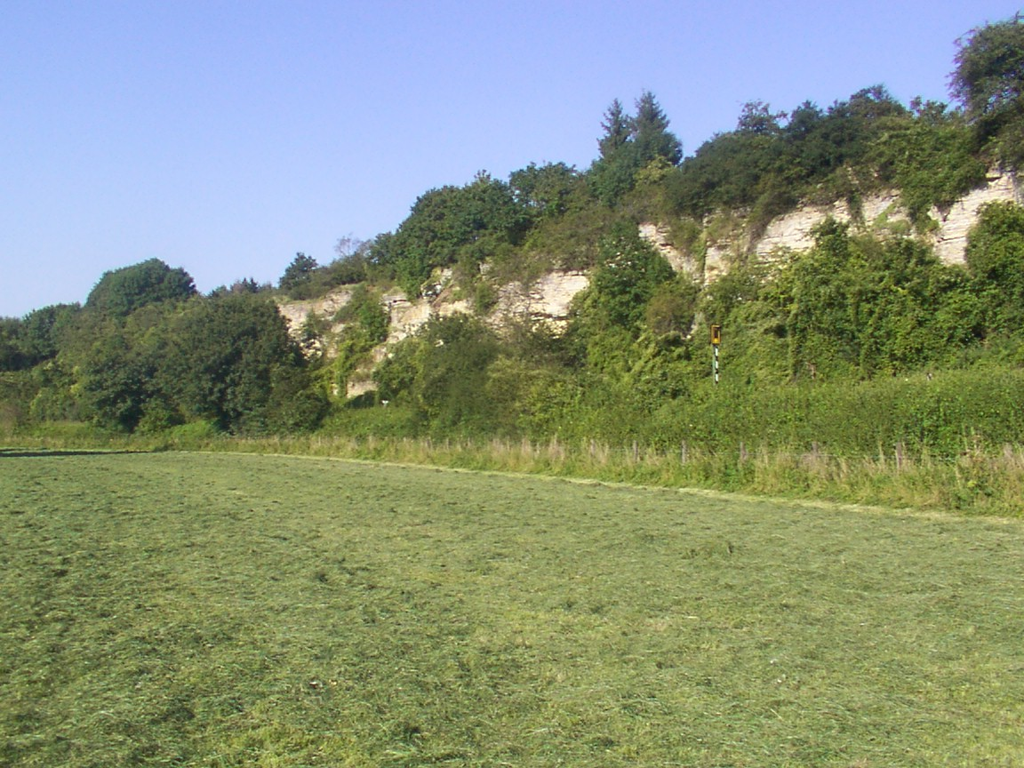 Schichtstufe überm Almetal bei Kirchborchen